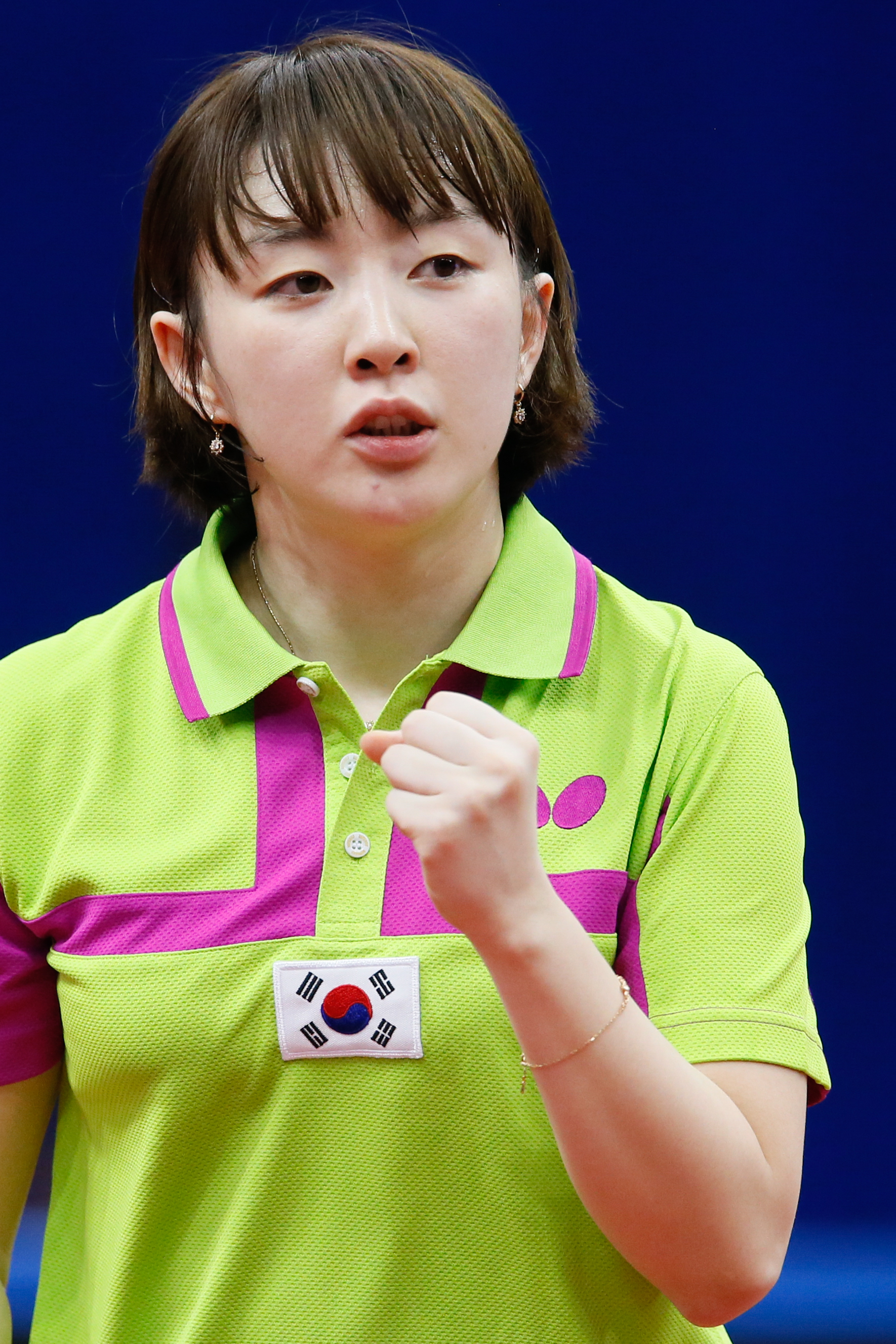 _K0K9636